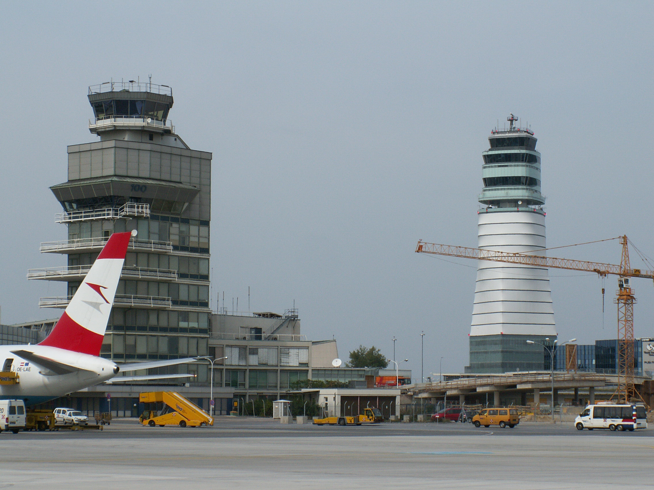 Eine echte Seltenheit: Zwei Flugsicherungstower nebeneinander. Im Vordergrund der alte, welcher mittlerweile schon abgerissen wurde, im Hintergrund der neue Tower von Wien (VIE, LOWW), 109 Meter hoch und am 13. September 2005 offiziell eröffnet.